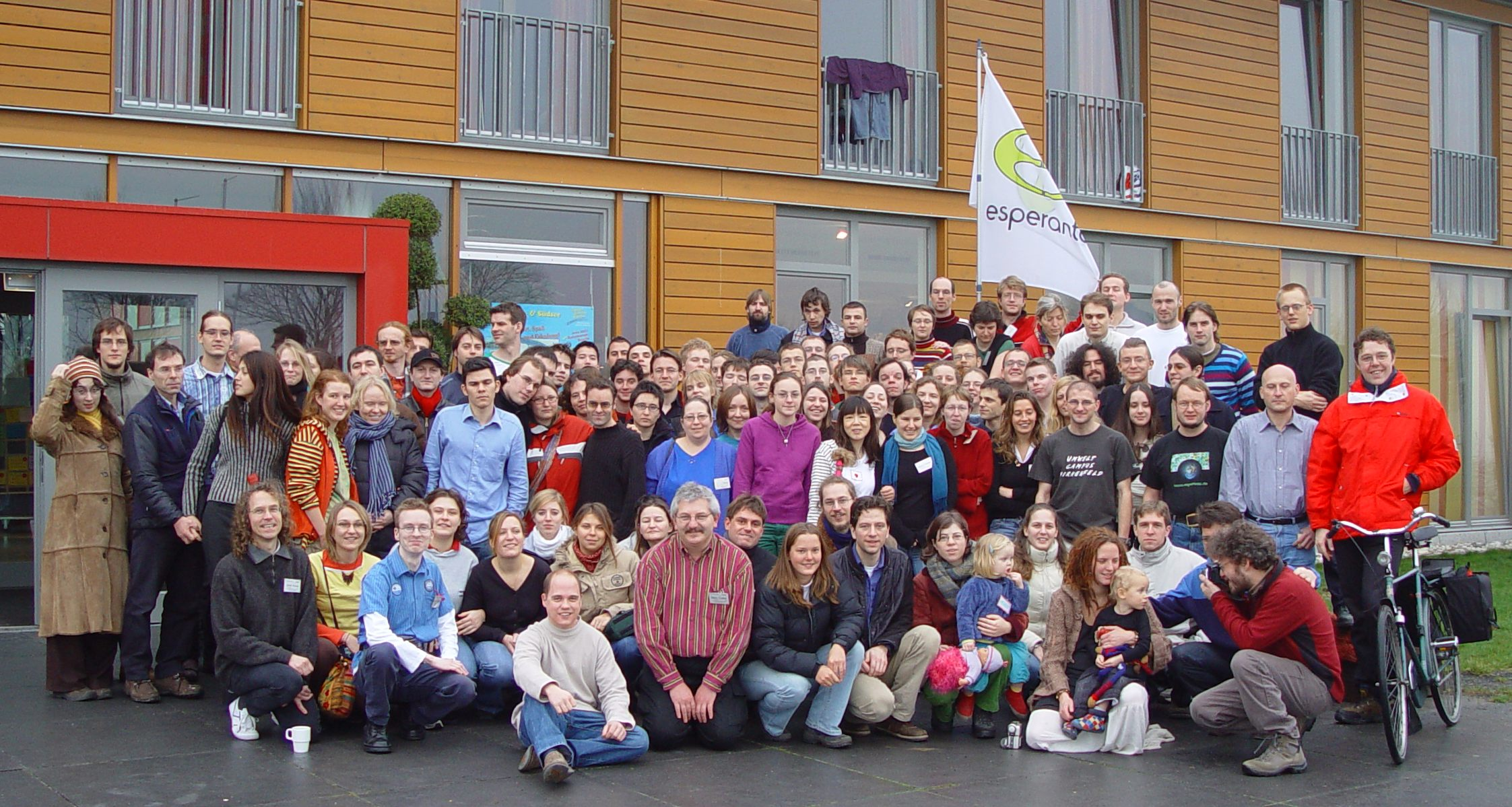 grupfoto dum la 49a Internacia Seminario 2005/2006 en Xanten (ne ĉiuj partoprenintoj ĉeestis)